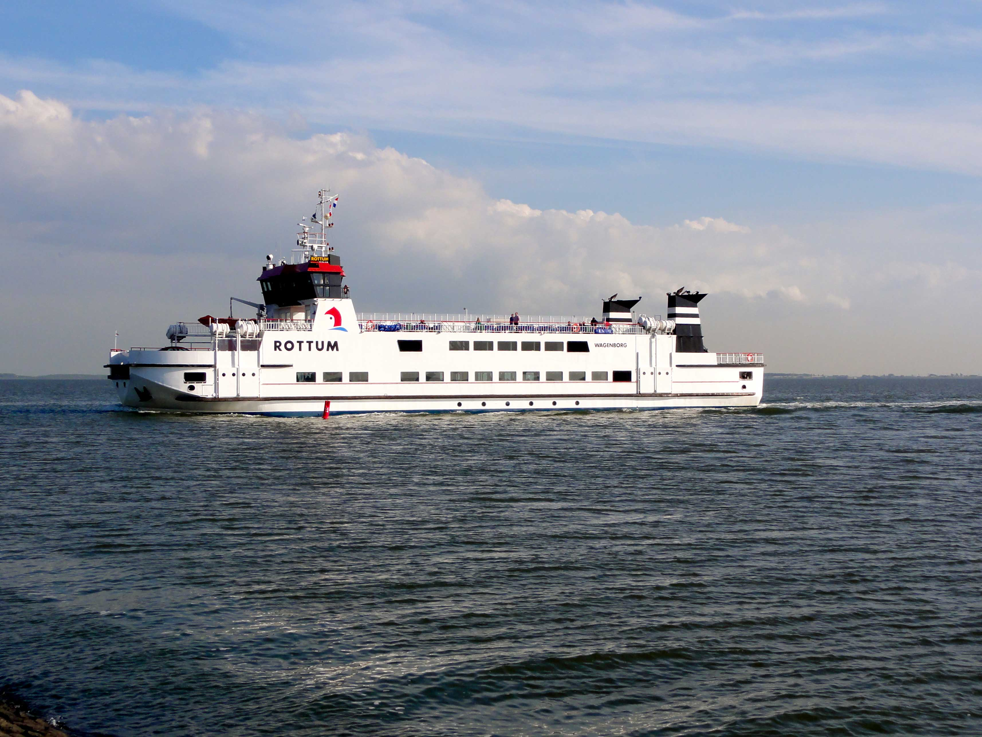 De veerboot Rottum, veerdienst Lauwersoog-Schiermonnikoog